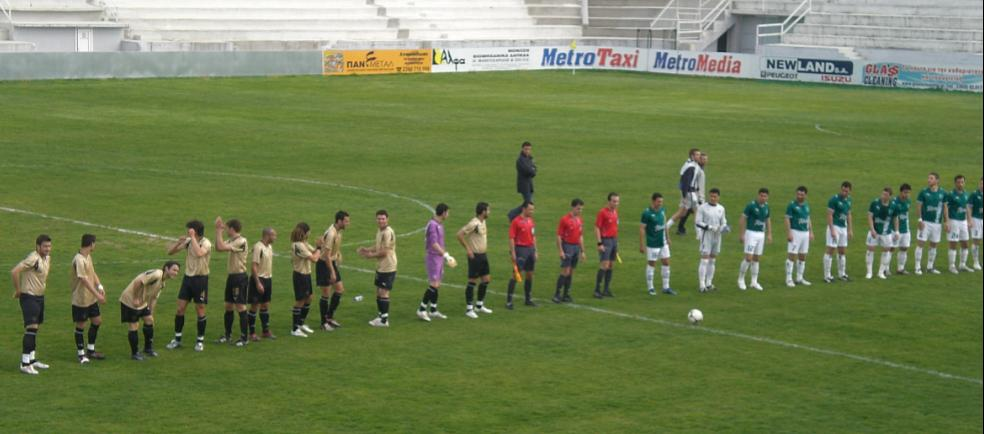 Description Entrée de l'équipe de Niki Volos FC pour le match de Gamma Ethniki contre Makedonikos, saison 2008-2009 Date12/4/2009SourcePersonnelle, DeleurmeaAuthorDeleurmea Entrée de l'équipe de Niki Volos FC pour le match de Gamma Ethniki contre Makedonikos, saison 2008-2009